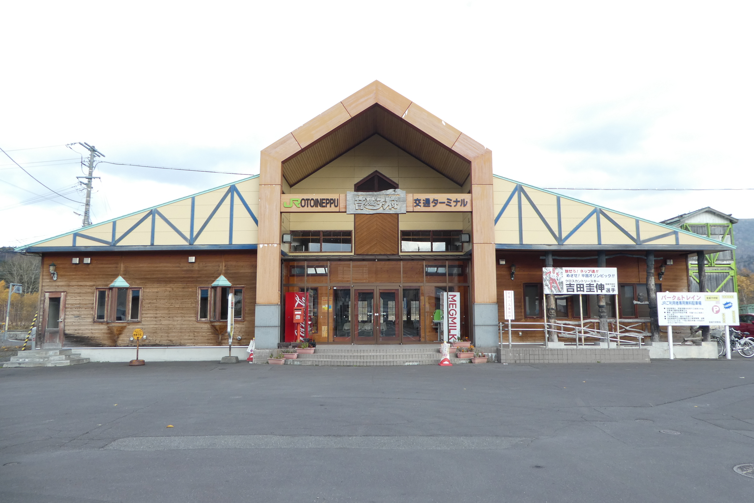 音威子府駅。2017年10月